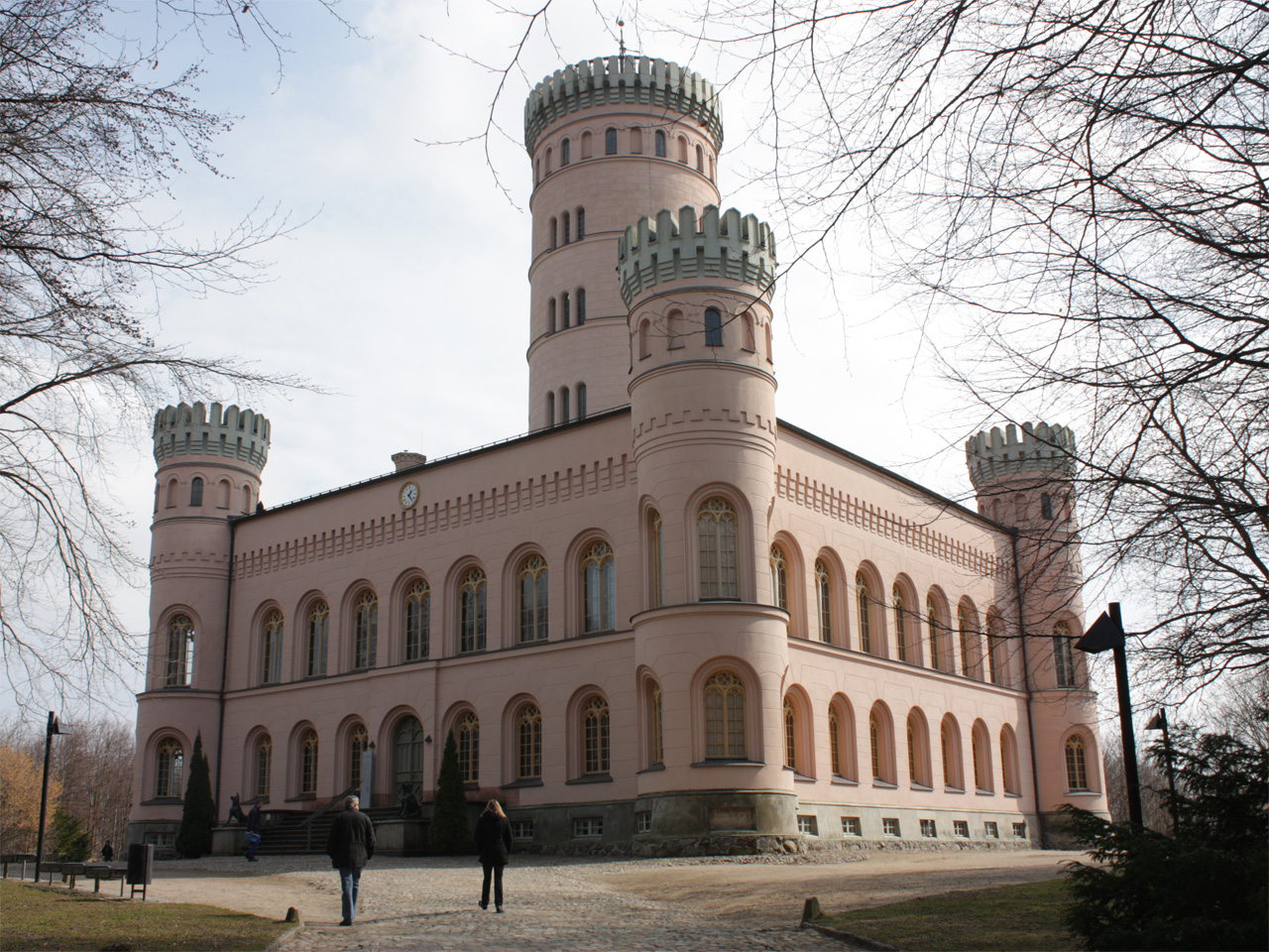 Jagdschloss Granitz